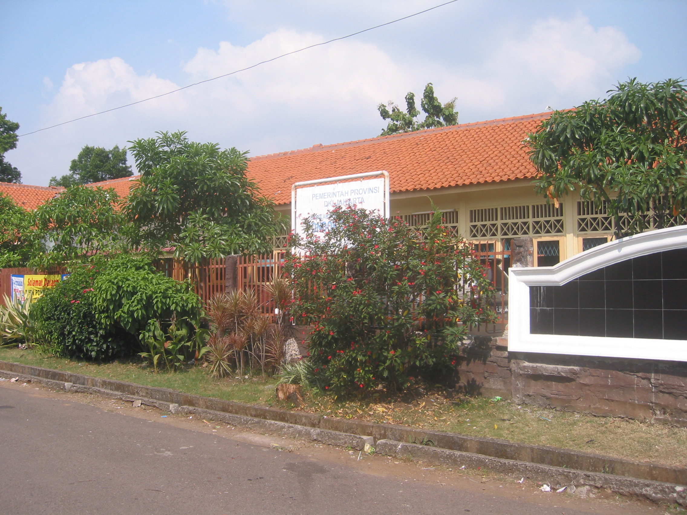 SDN Pondok Labu 07 Pg